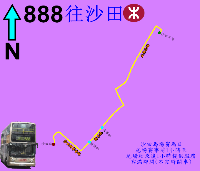 中文（香港）: 馬場巴士888線的走線圖